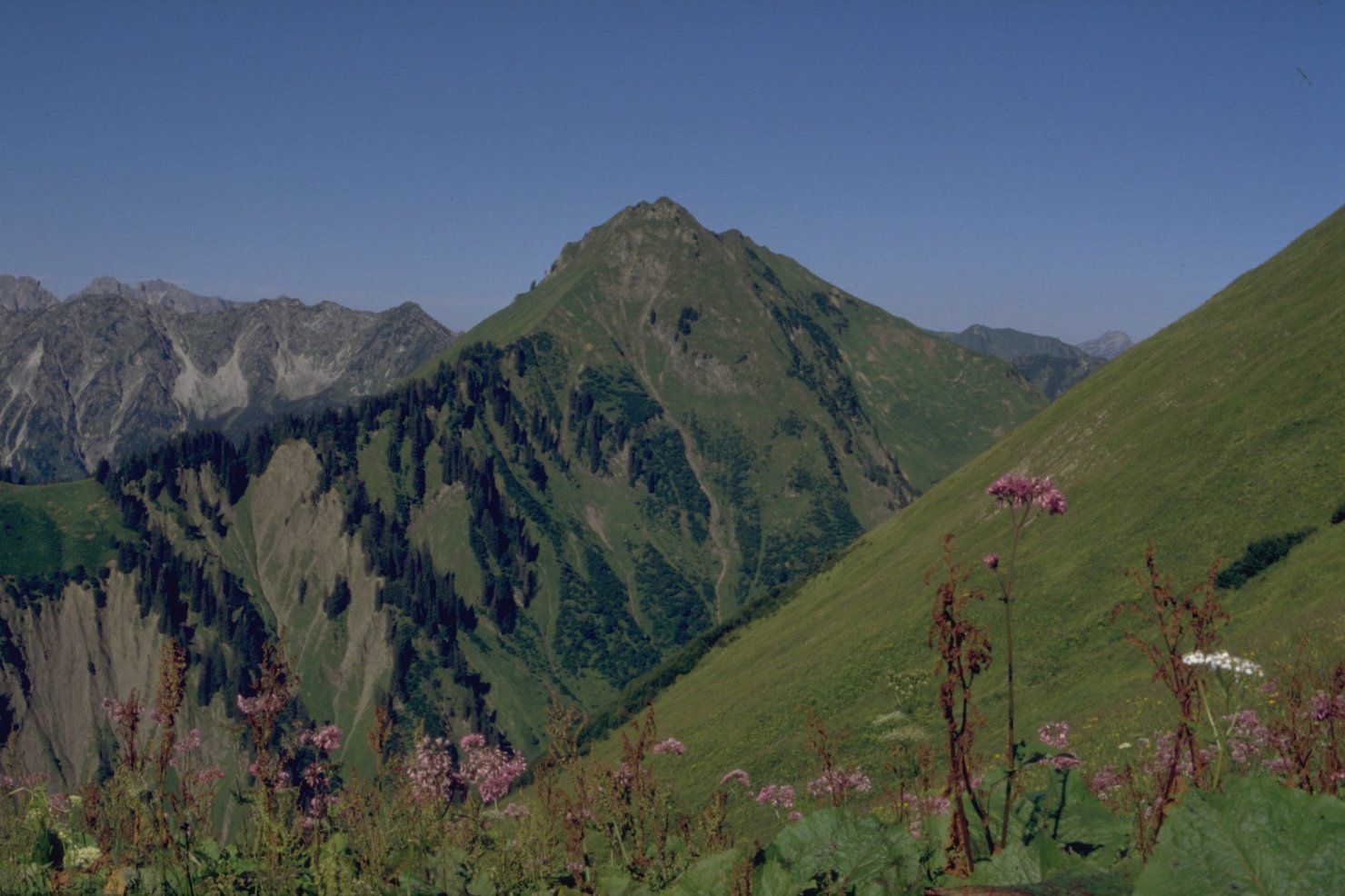 Kegelkopf vom Älpelesattel